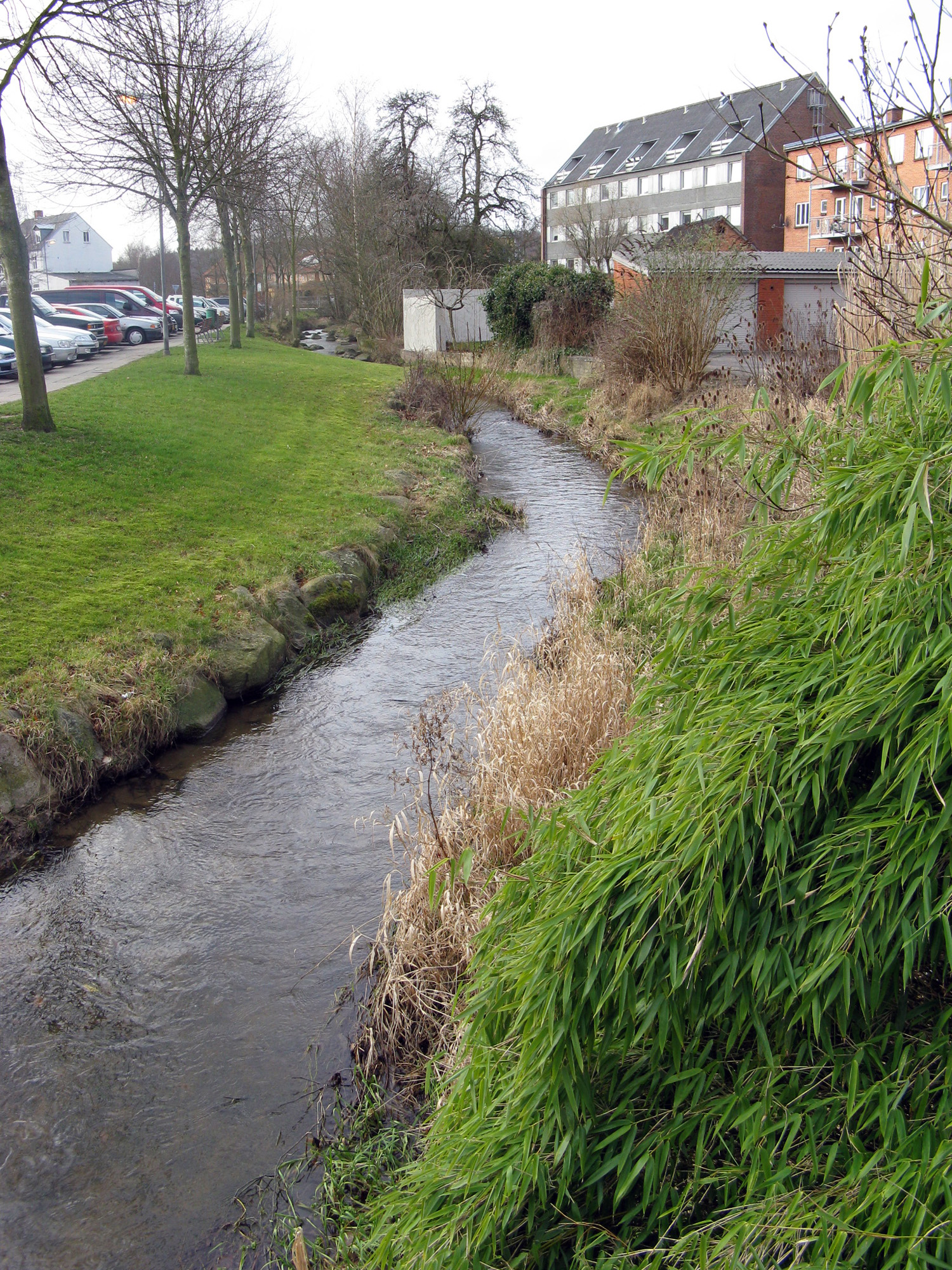 Odder Å i Odder